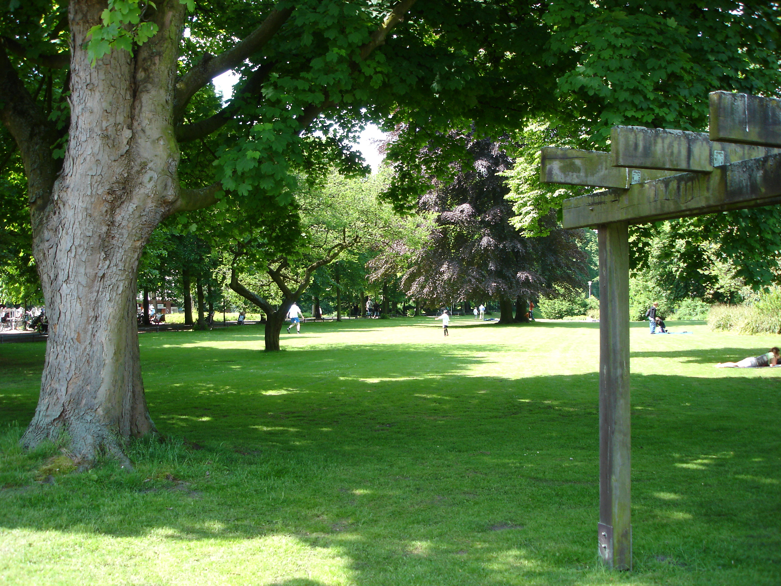 Der Coerdeplatz in Münster, Westfalen, Deutschland